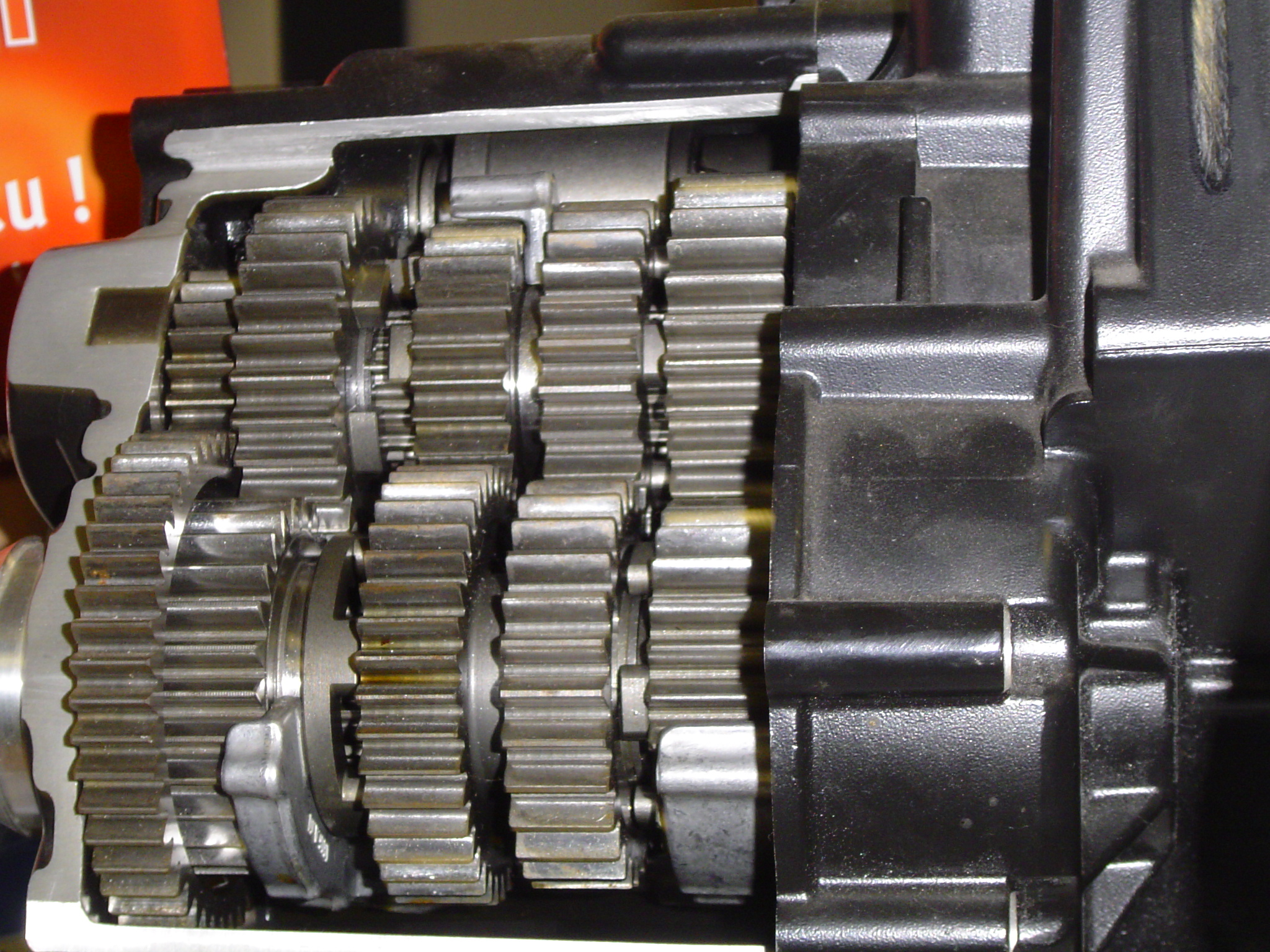 Een versnellingsbak van BMW.